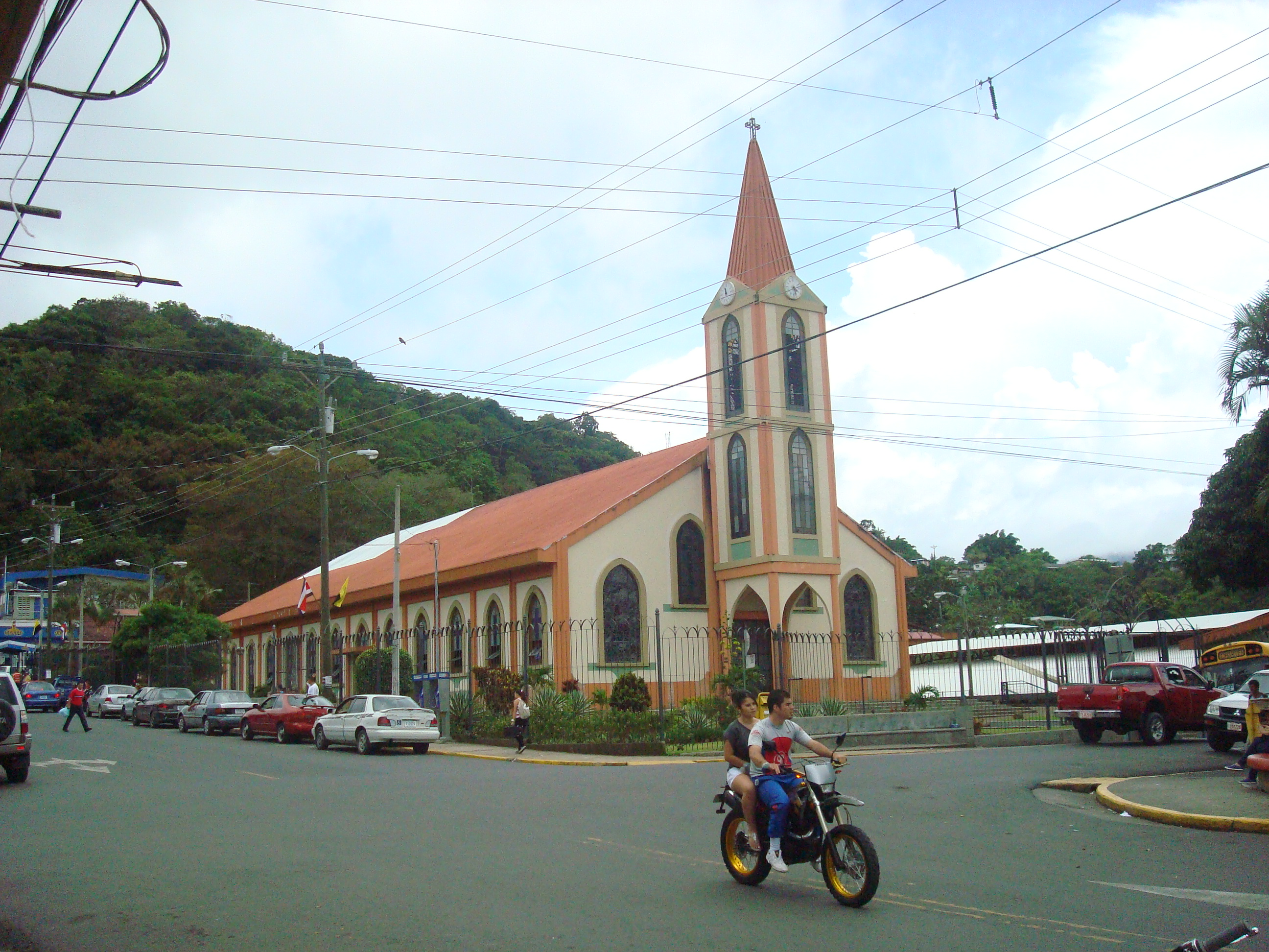 Iglesia de San Ignacio de Acosta, Costa Rica.